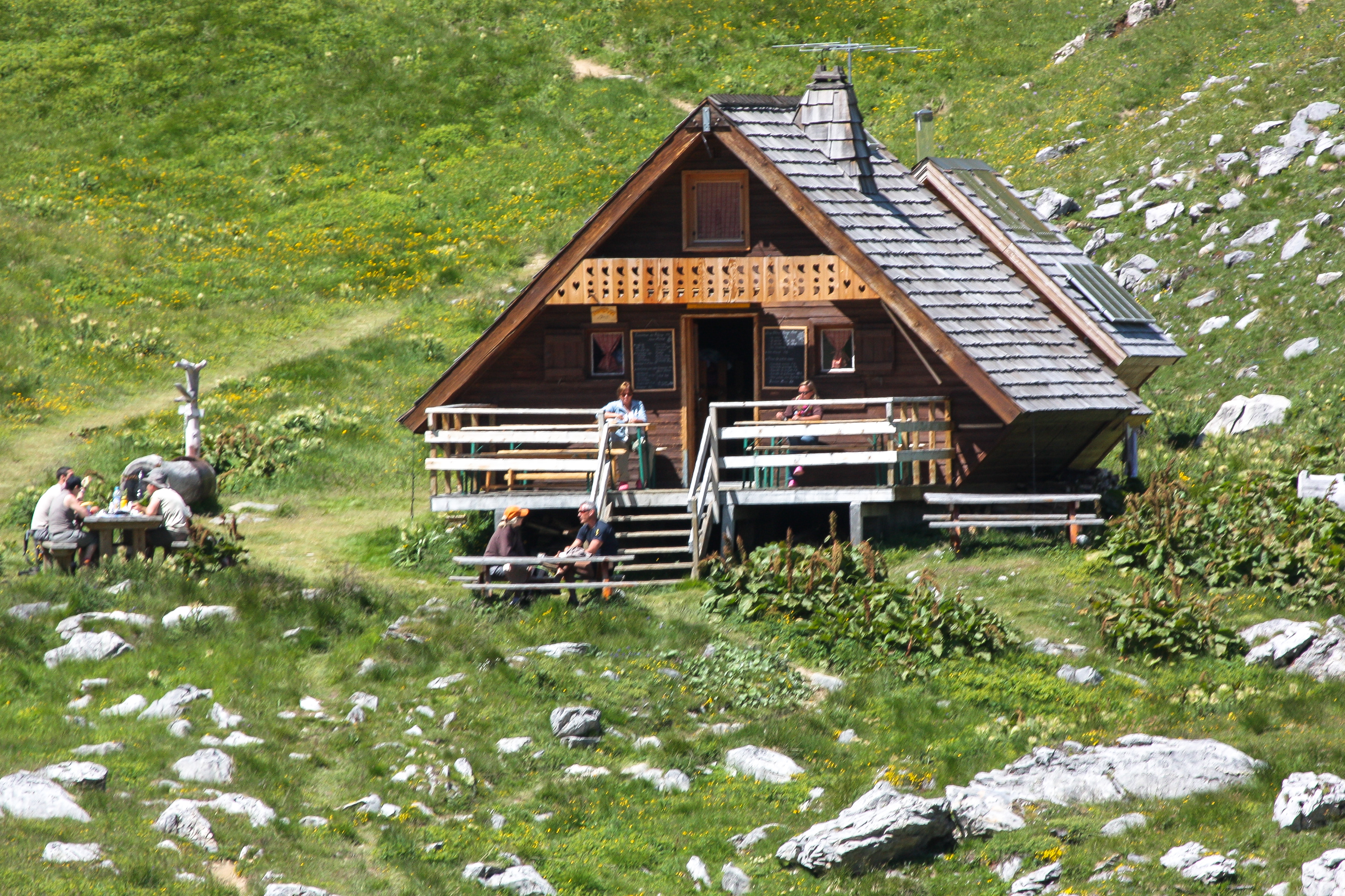 Le refuge avec toit pyramidal, façade en bois, est entouré de bancs et de fontaines en bois.